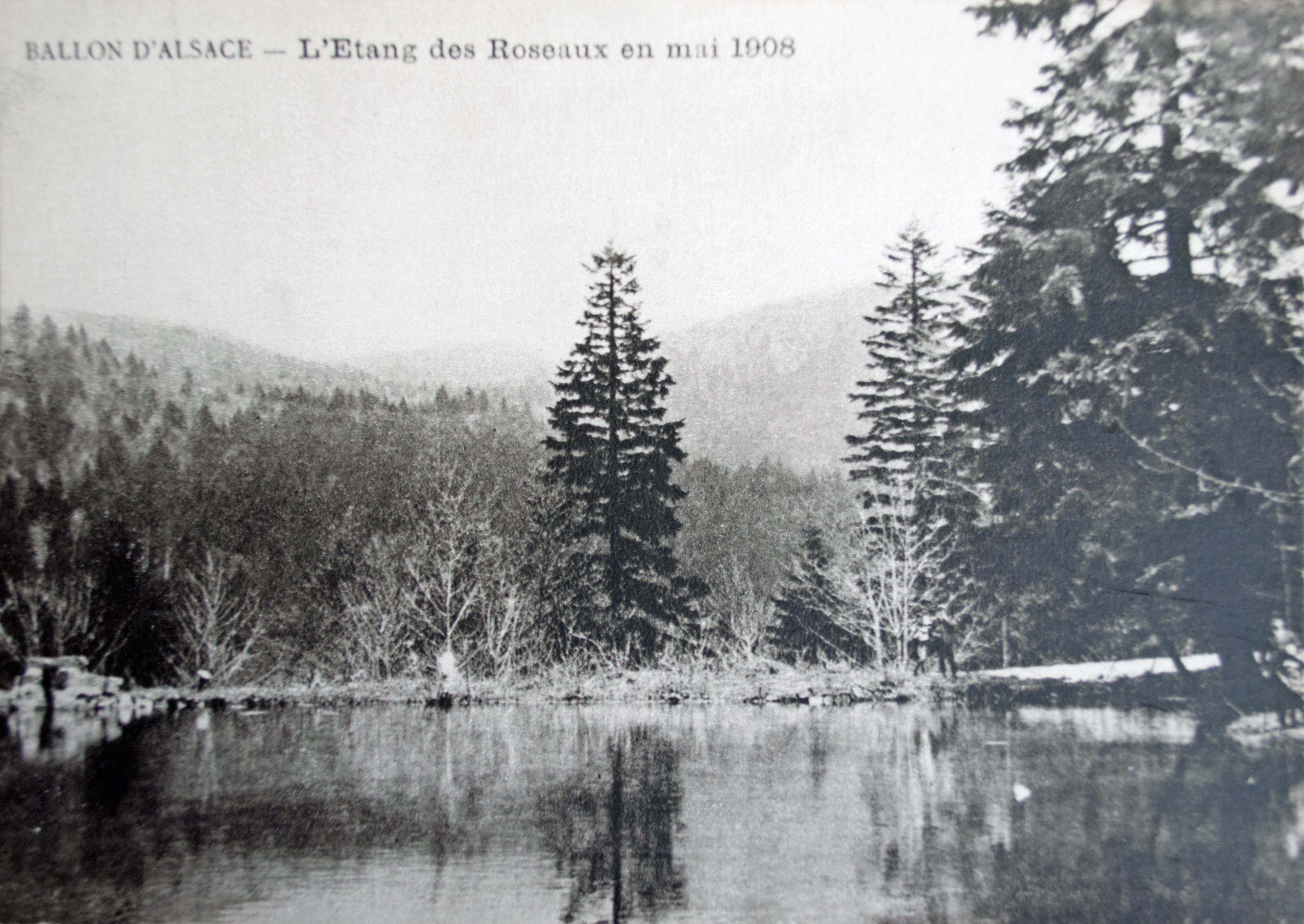 reproduction d'une carte postale ancienne (1908) sans mention de l'auteur ni de l'éditeur (travail anonyme)